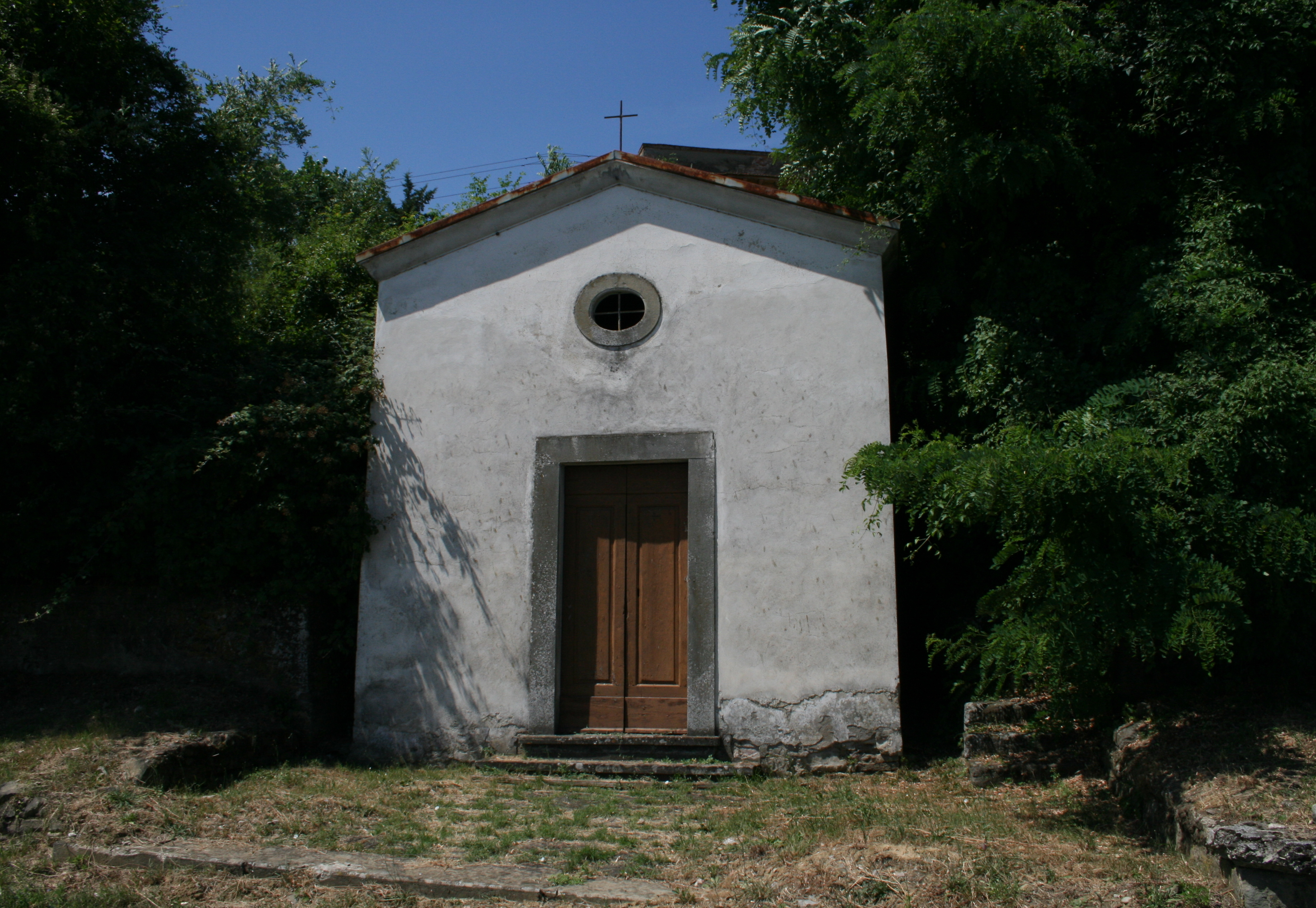 Santa Umiliana de' Cerchi chapel